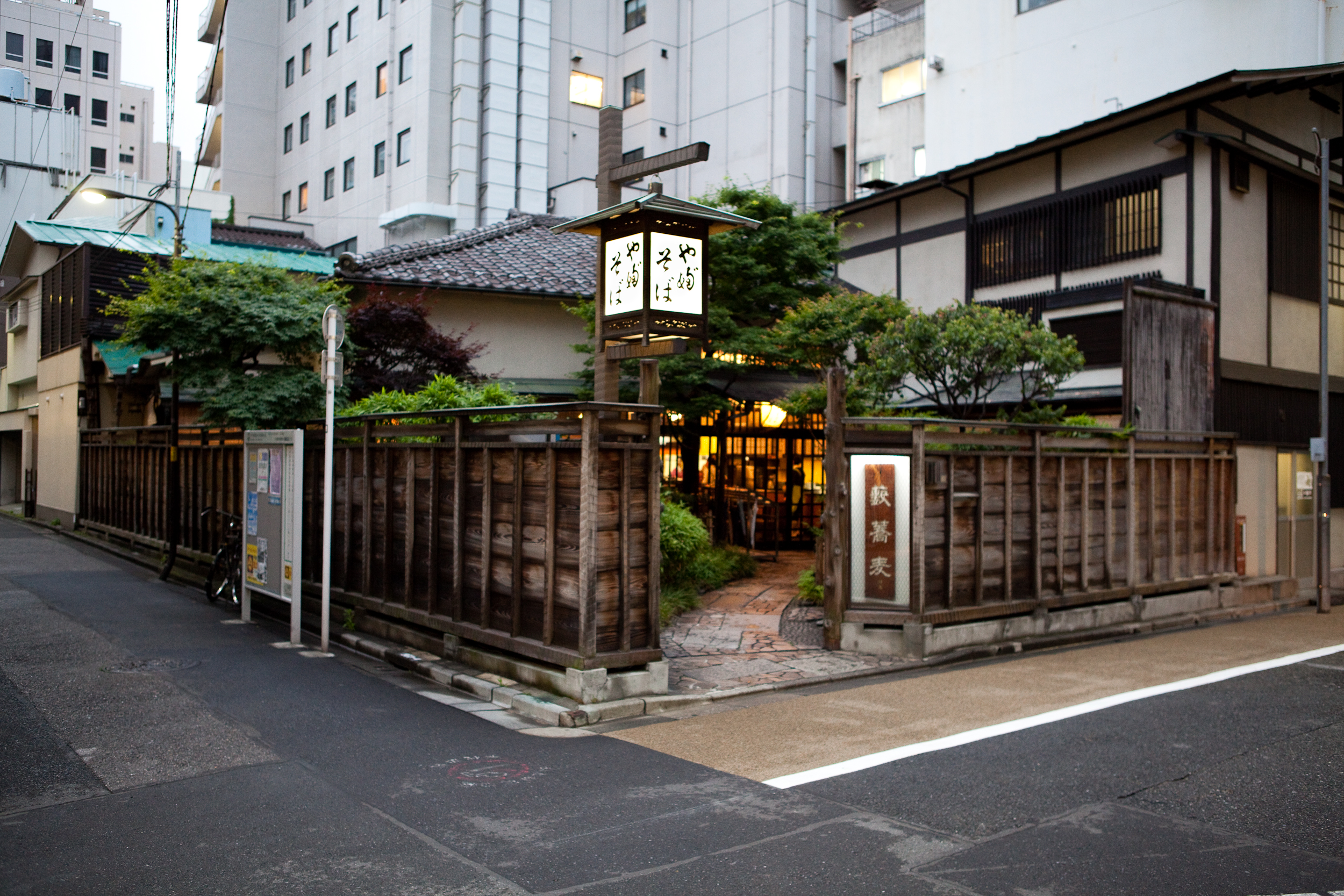 蕎麦屋（東京・千代田区神田須田町1-19－9、小川町駅最寄りの「神田藪蕎麦 かんだやぶそば」[1]）